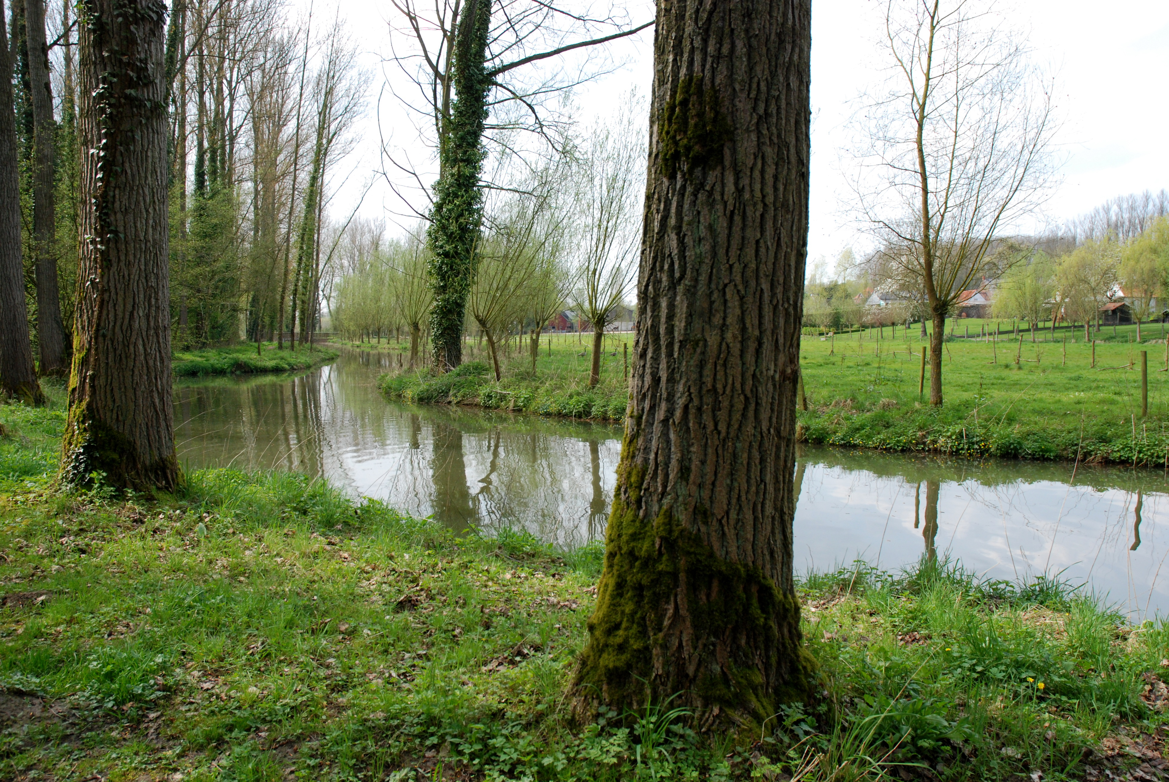 de Zwalm in de gemeente Zwalm, België